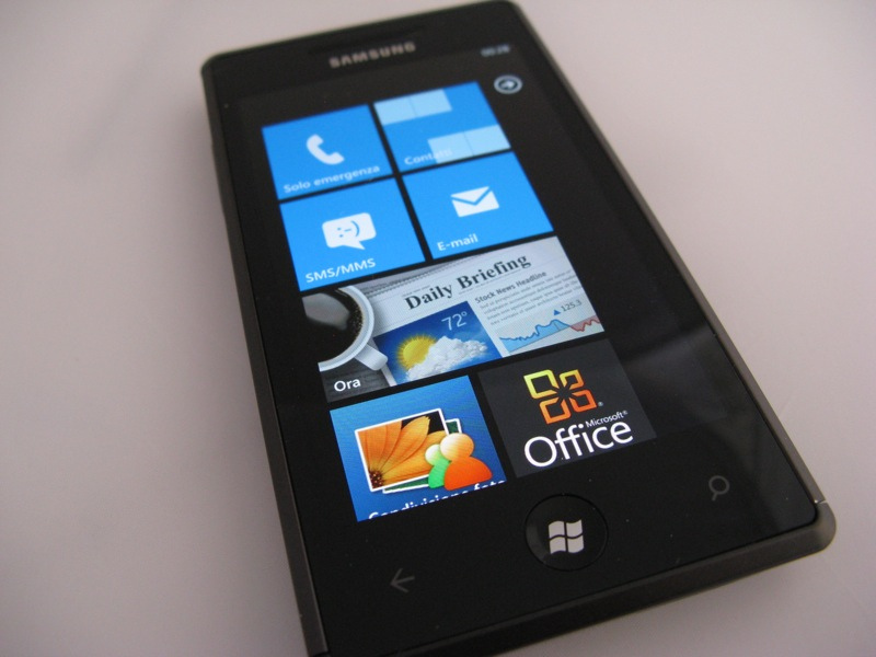 samsung omnia 7 - 05